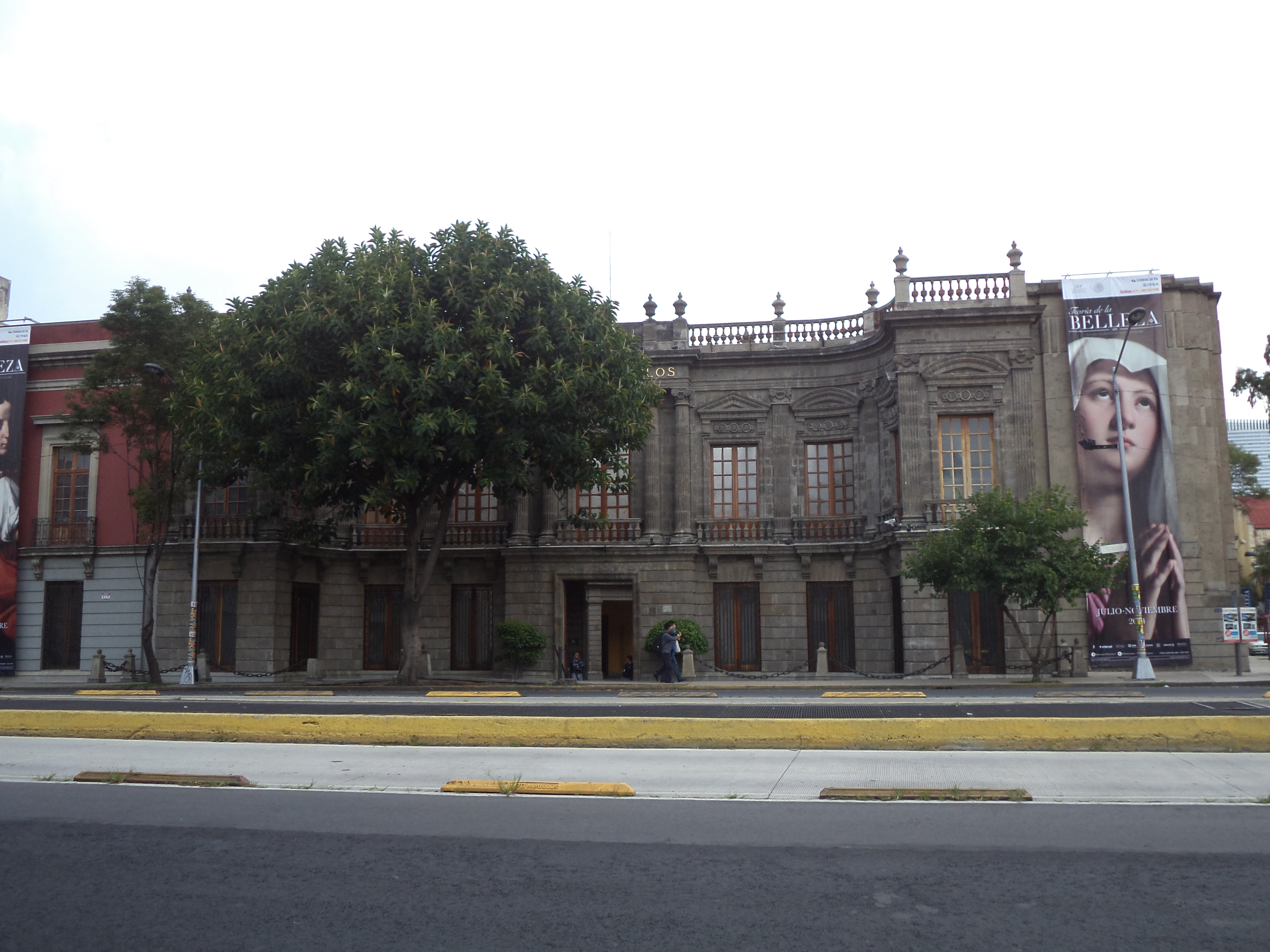 Museo de San Carlos